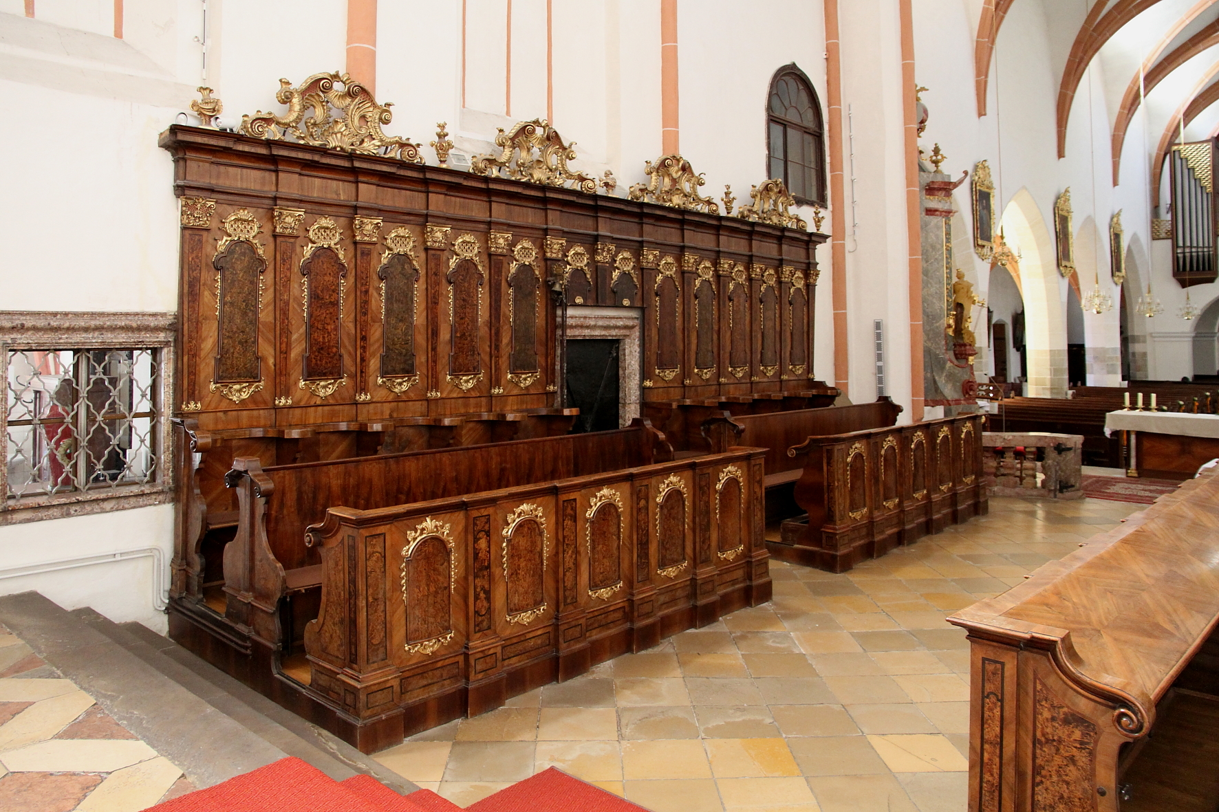 Das Chorgestühl in der Stadtpfarrkirche hl. Stephanus in der niederösterreichischen Stadt Tulln.